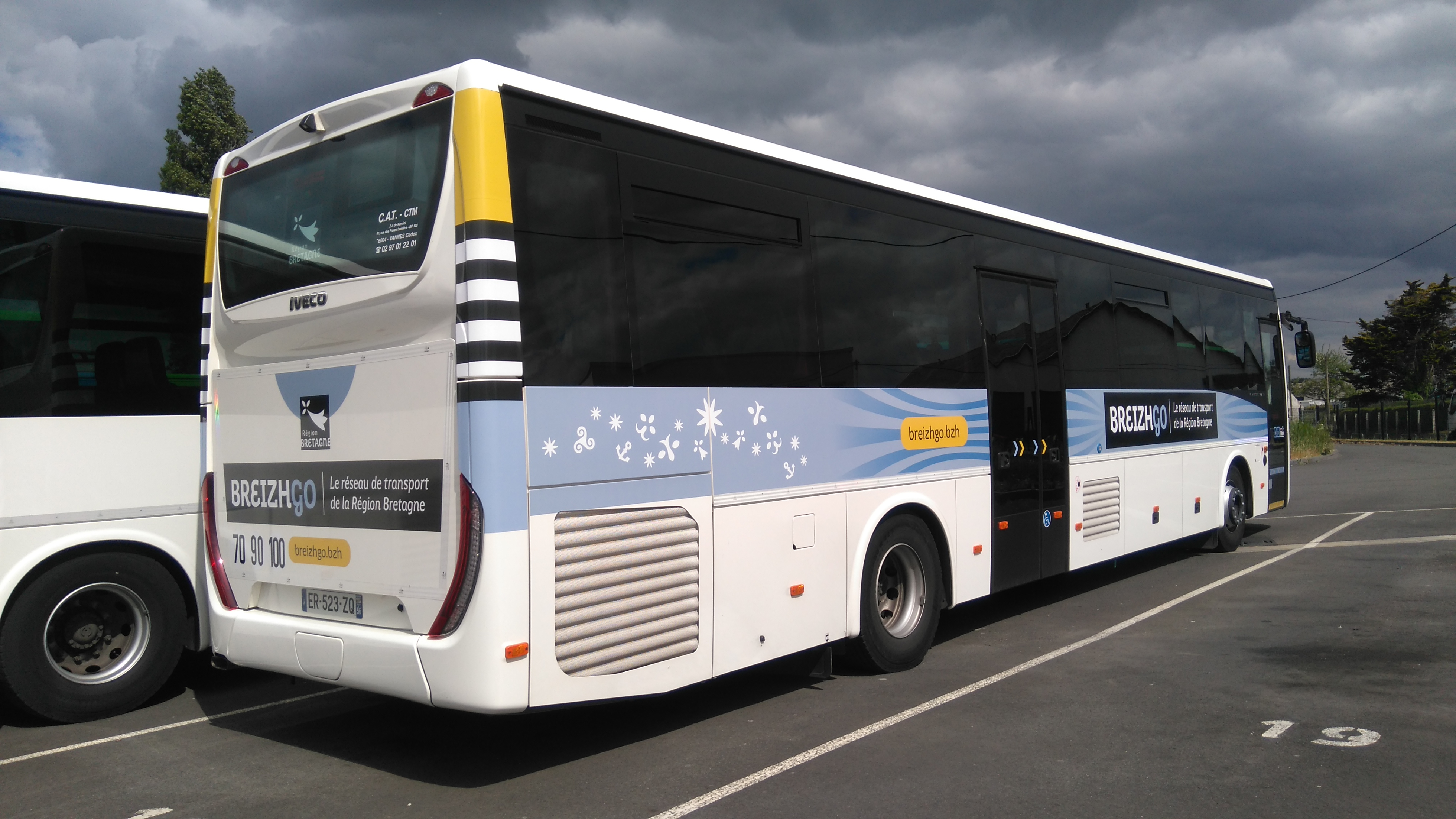 Iveco Bus Crossway Line 13 - BreizhGo